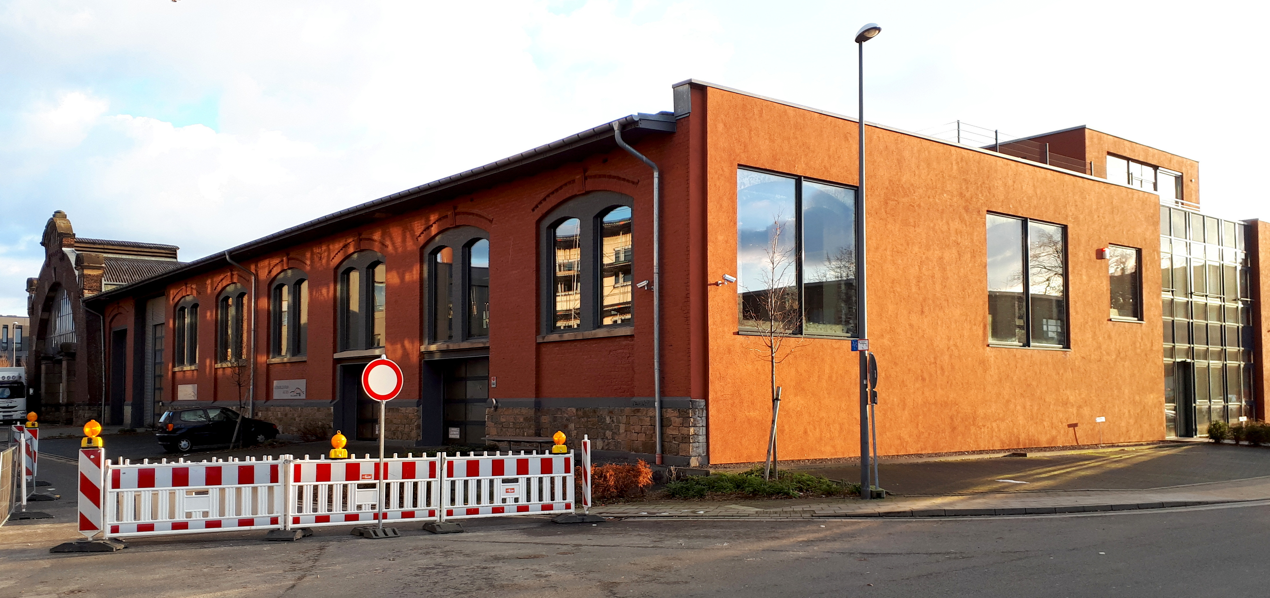 Schweineschlachthalle des Alten Schlachthofes Aachen, Im Hintergrund Nordeingang der Verbindungshalle; Baudenkmal